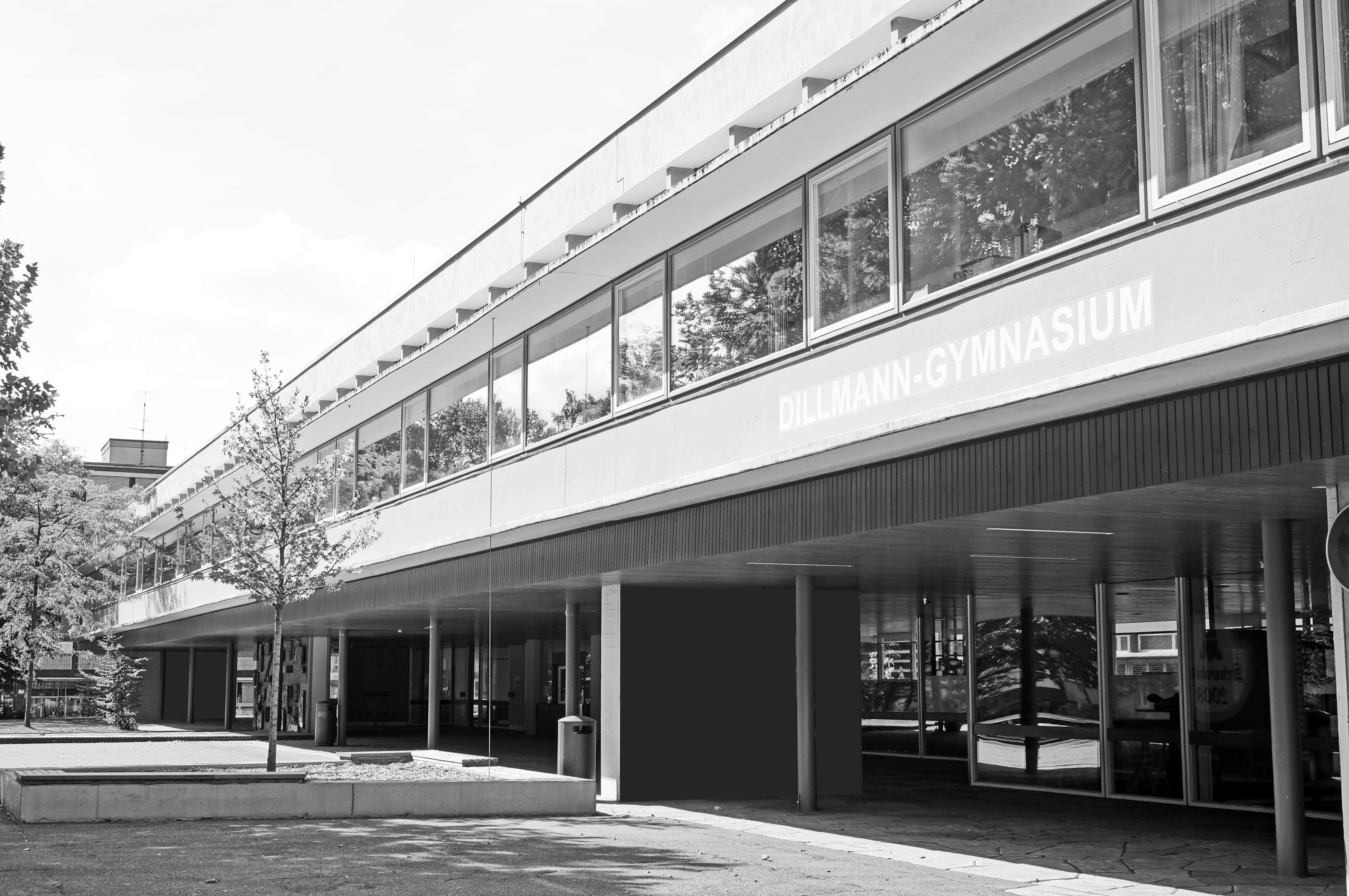 Verwaltungsbau